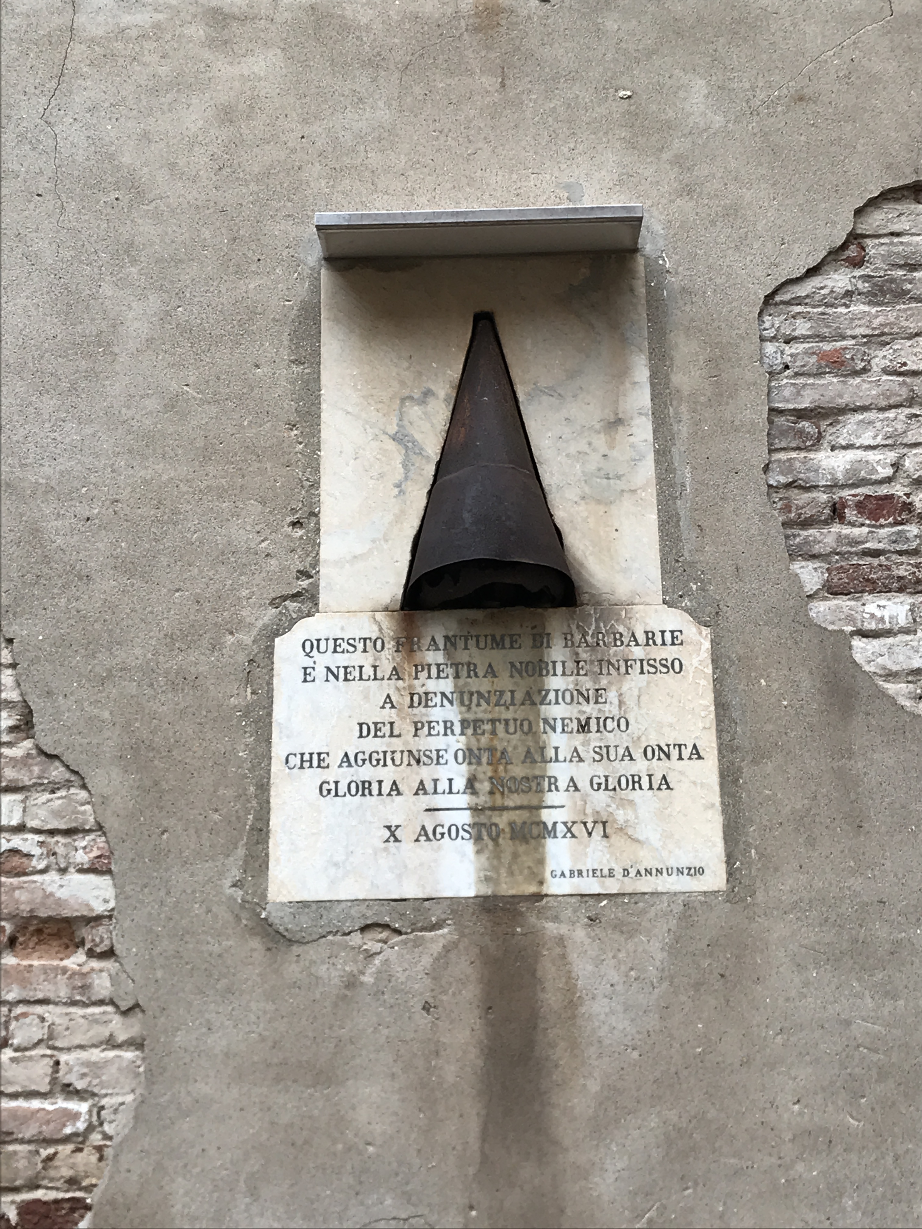 Venezia Campiello Albrizzi Lapide con granata austriaca e iscrizione dannunziana